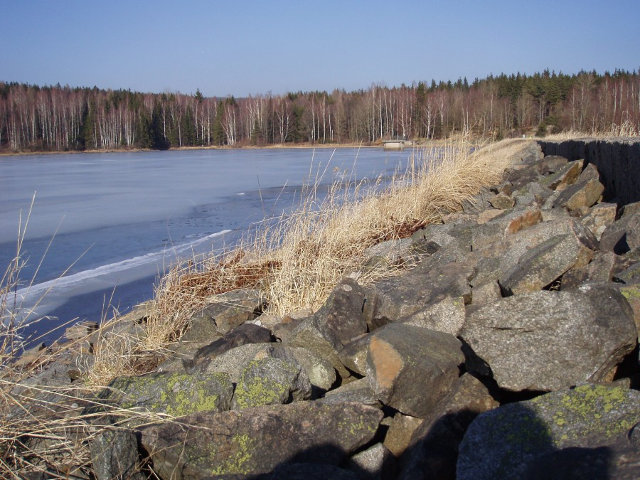 Vodní nádrž Octárna v Brdech